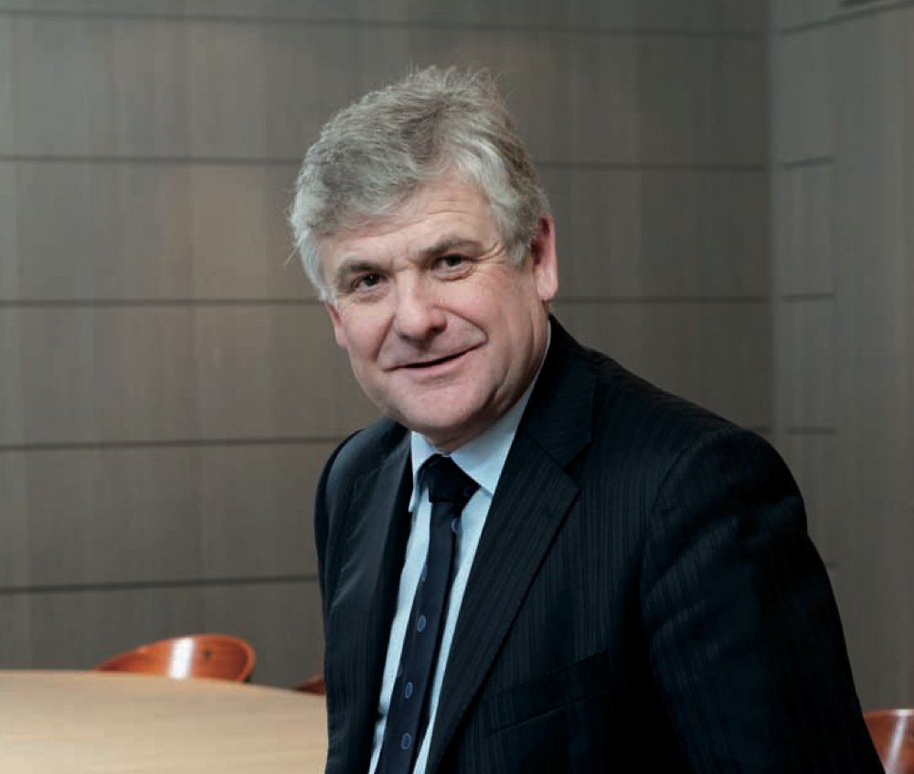 portrait de Jacques Nicolet